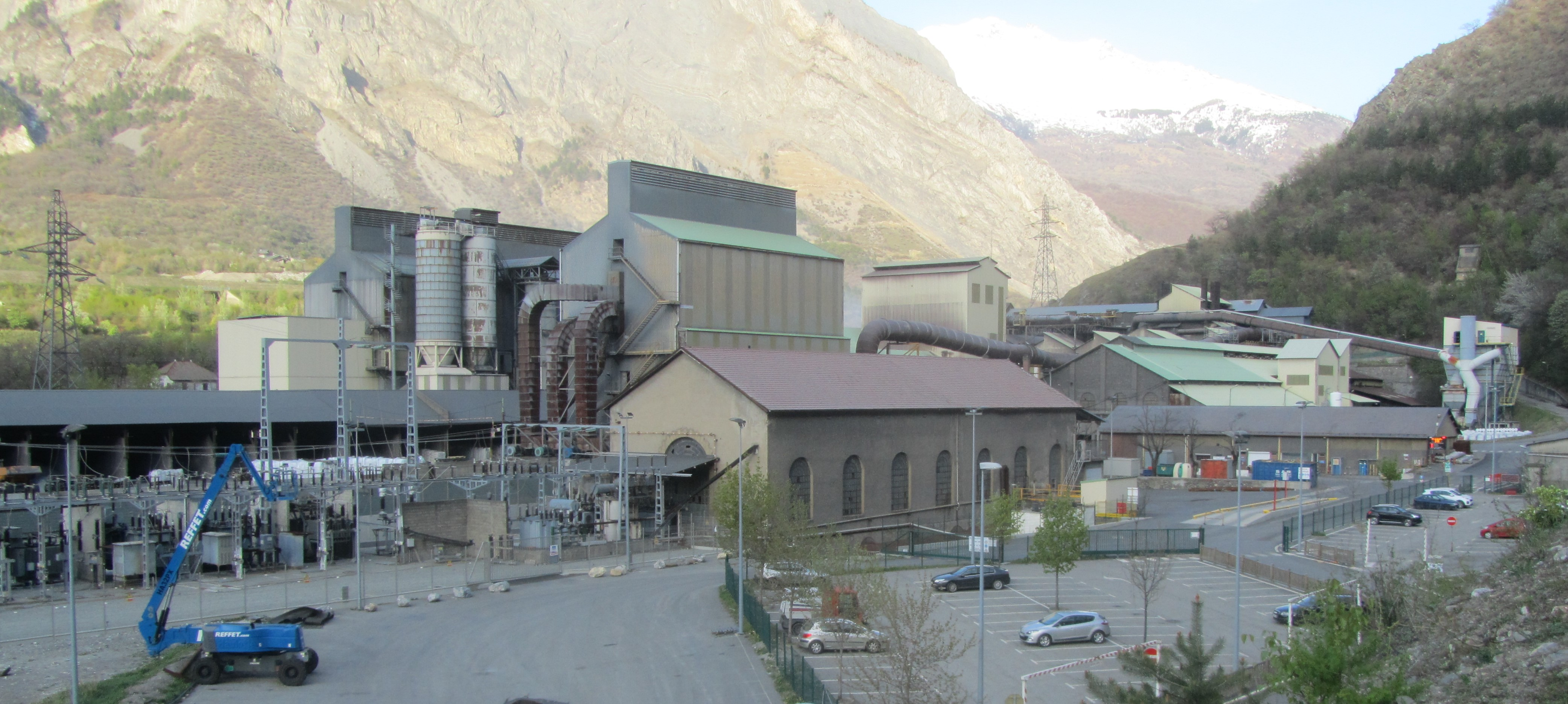 L'usine de Montricher en 2018. Elle appartient à FerroAtlántica depuis 2005. Elle s'est spécialisée dans la production de silicium dit solaire pour les panneaux photovoltaïques.